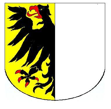 Eigen tekening Robert Prummel